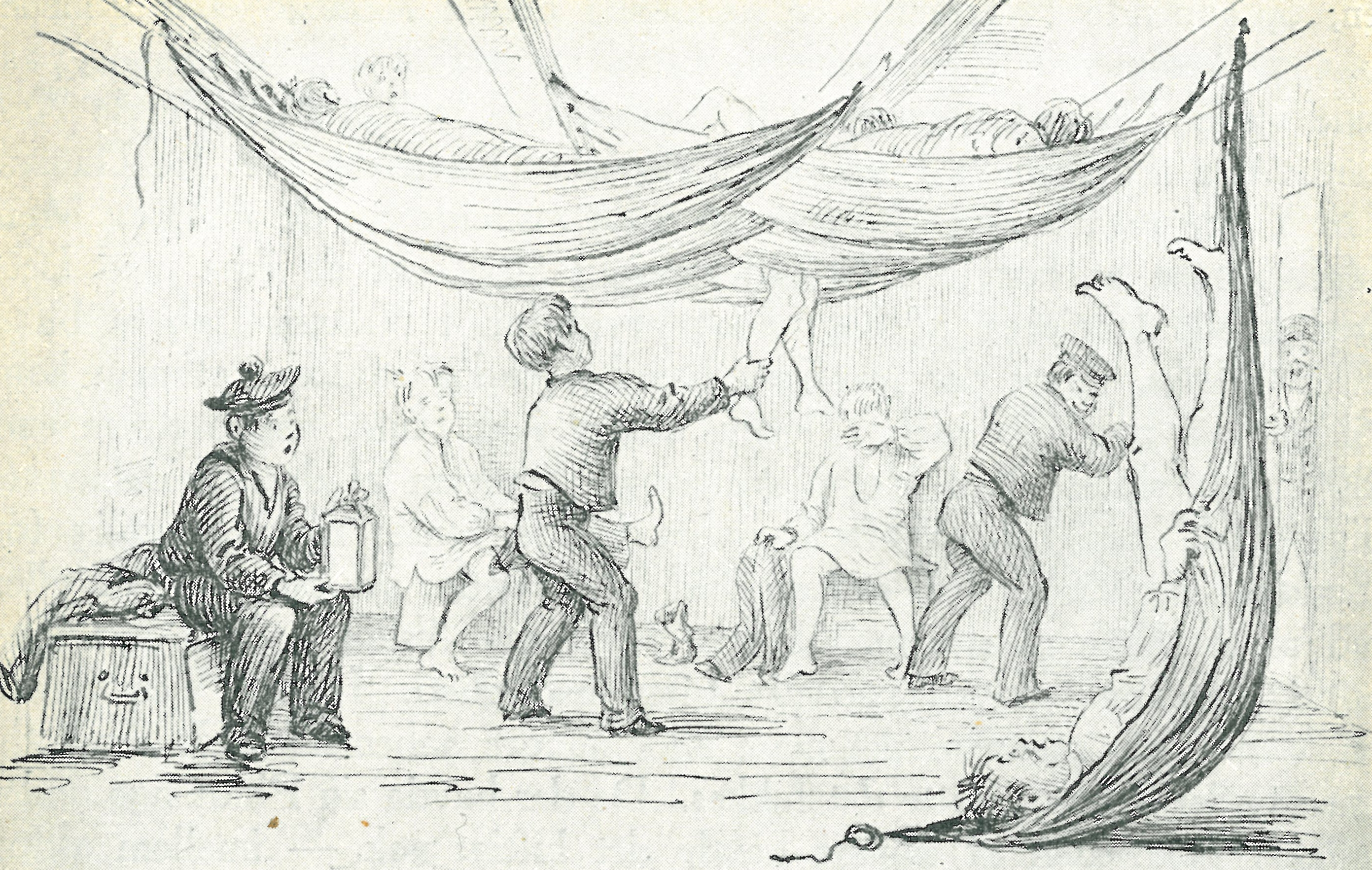 "Udpurring til Vagt. Pennetegning ca. 1880."